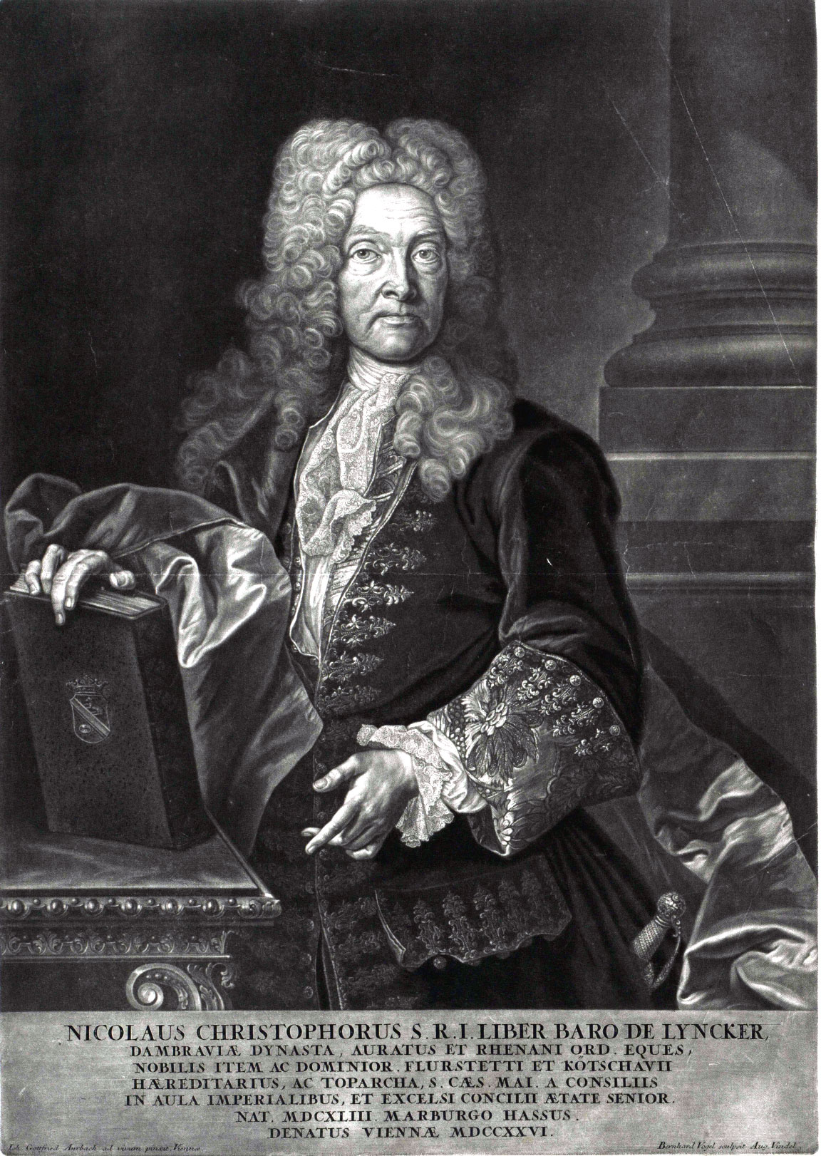 Nikolaus Christoph von Lyncker (1643-1726) war ein deutscher Rechtswissenschaftler und Reichshofrat in Wien